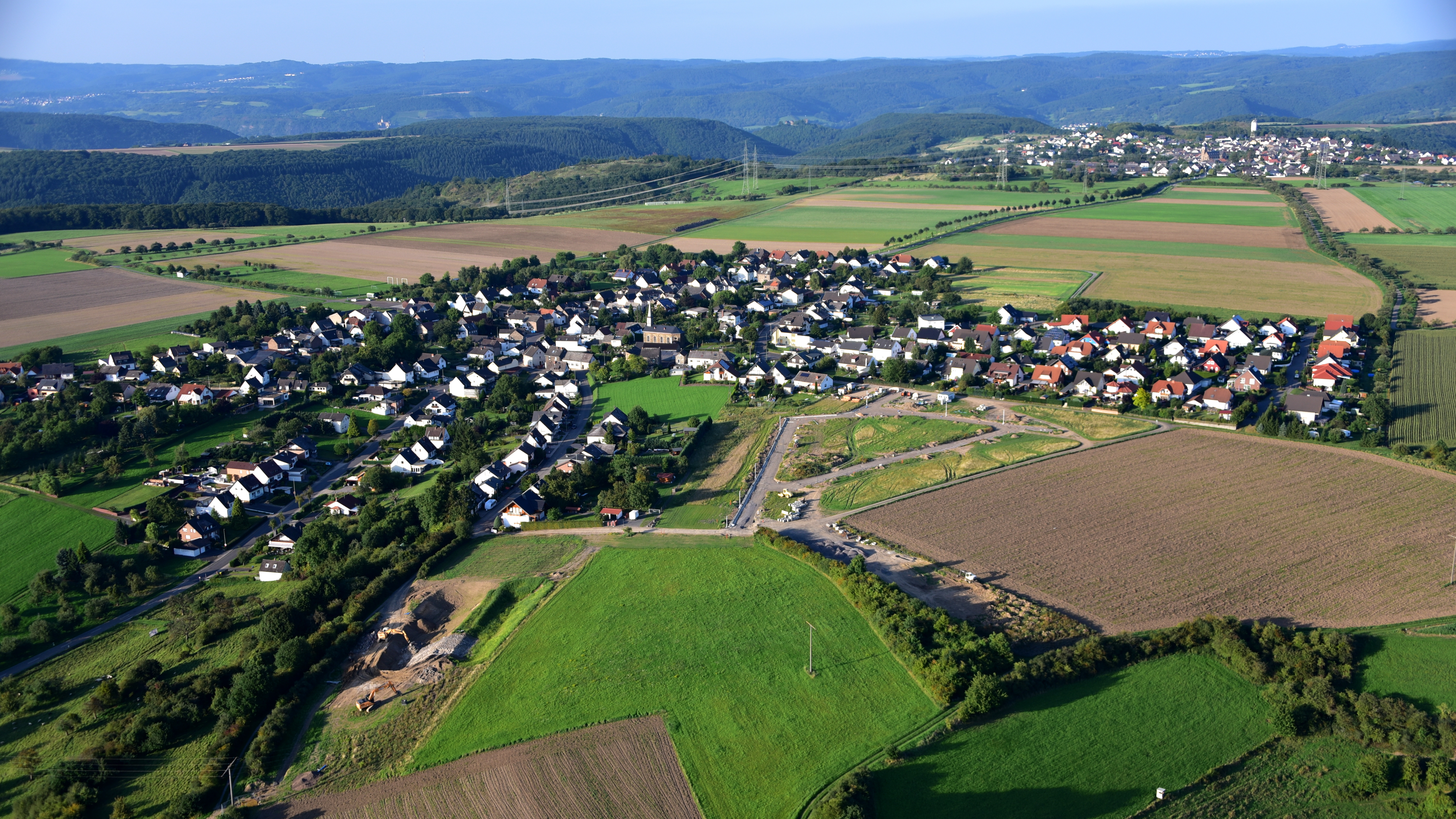 (Ober)Lützingen, Luftaufnahme (2017)